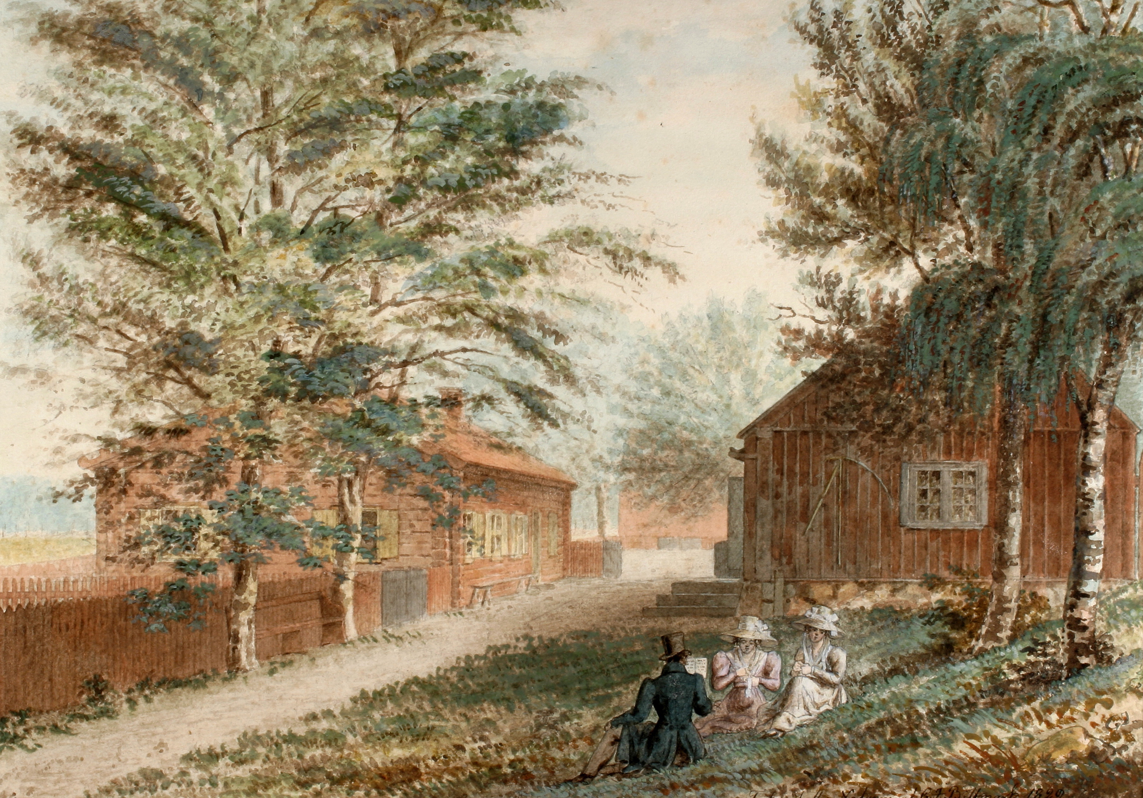 Carl Johan Billmark, Grupp i det gröna, akvarell, 1829. SSM_100557_0, Stadsmuseet i Stockholm. Konstnären samt mamsellerna Fredrika Wilhelmina Lindroth och Anna Maria Höglund vid torpet Glädjen utanför Skanstull juni 1829. Förmodligen menar man torpet Glädjen i Kärrtorp.